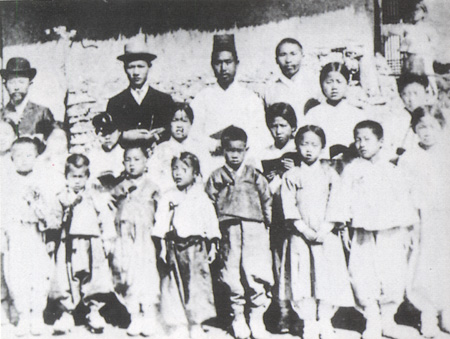 김구, 황해도 교육계몽활동